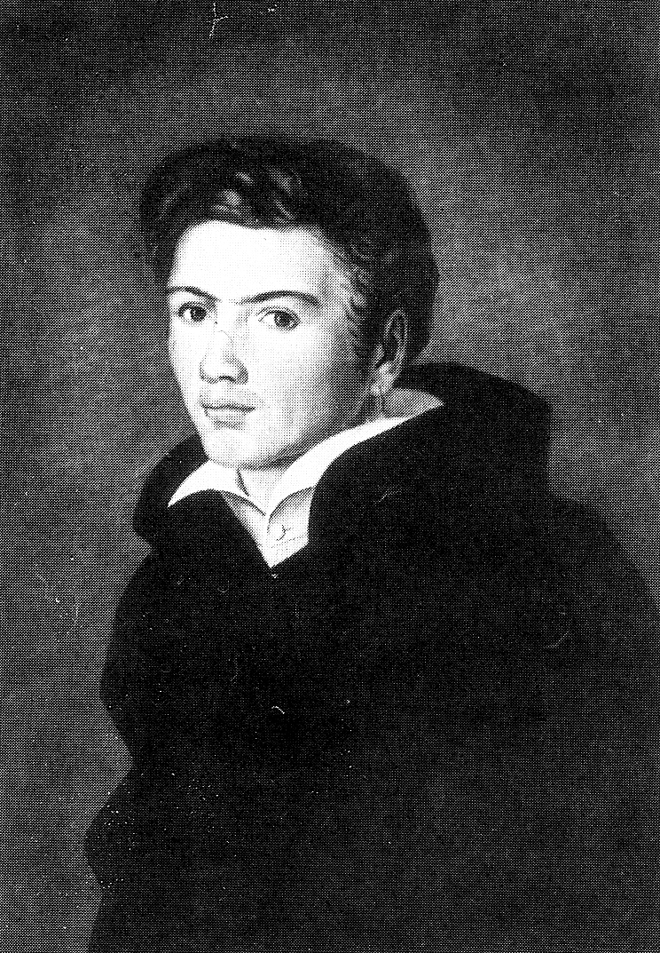 Anton von Nagel zu Aichberg (1798-1859), Abgeordneter der Paulskirche